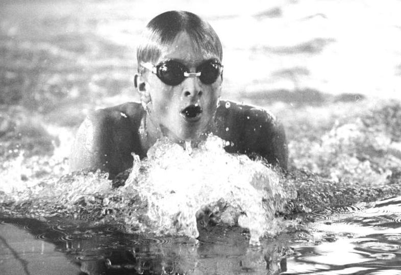 Patrick Kühl ADN-ZB Hirndorf 17.6.87 Erfurt: DDR-Meisterschaften im Sportschwimmen- DDR-Meister über 400 m Lagen der Herren wurde mit einer Jahresweltbestzeit von 4:20,37 min, Patrick Kühl vom ASK Potsdam, hier auf der Brust-Distanz.